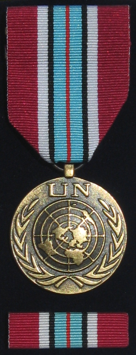 UNDOF medal - przód